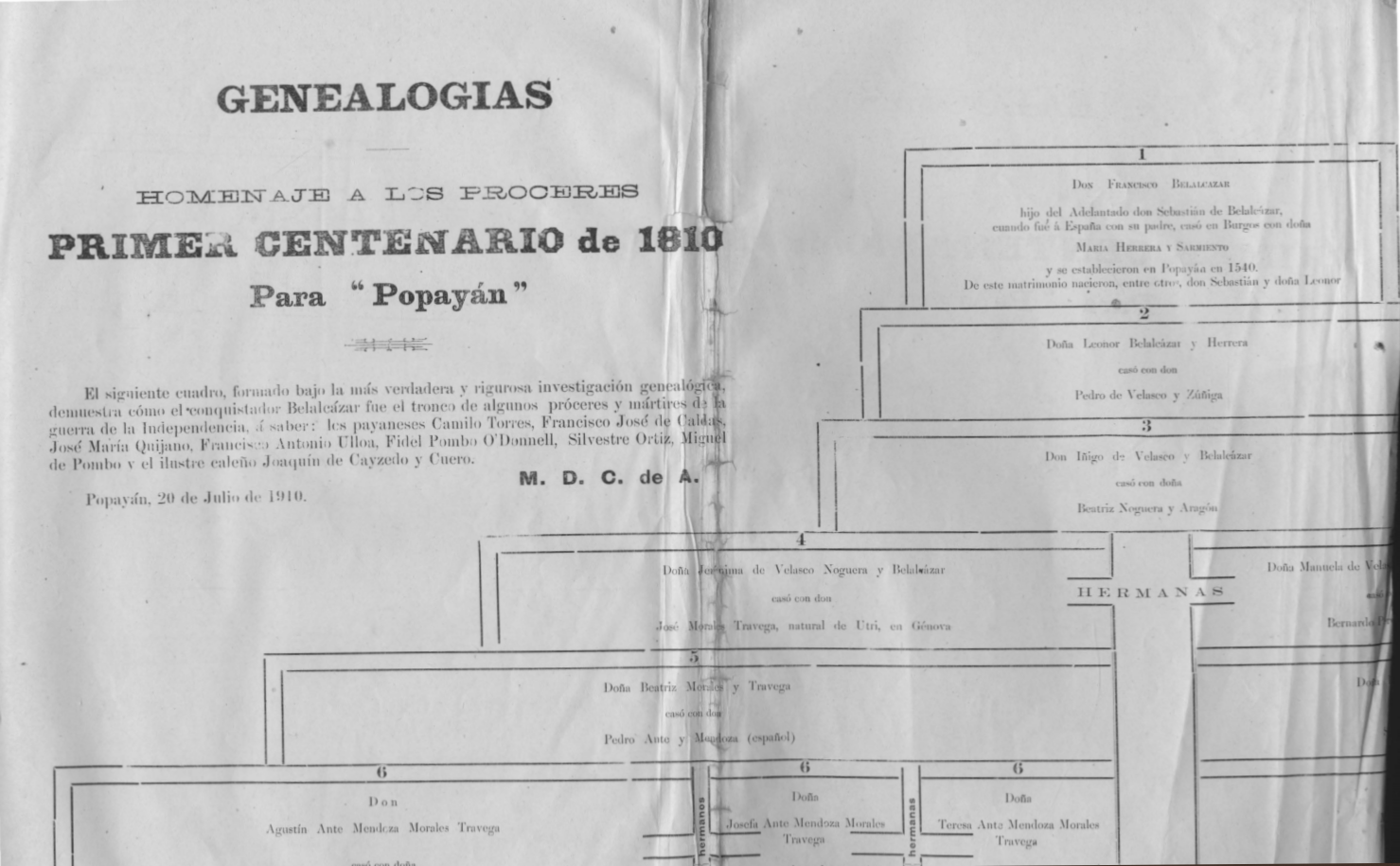 Revista Popayán - Cuadro genealógico elaborado por Margarita Diez-Colunje y Pombo